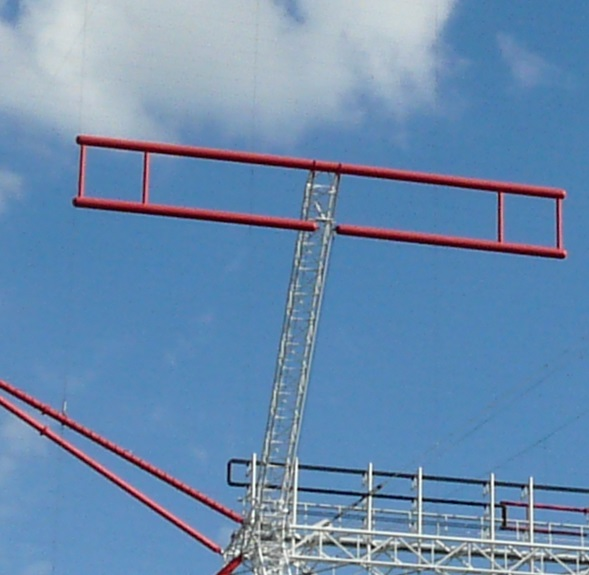 Detail einer Alliss-Antenne von Ampegon 1997: Dipol komplett in Rohrmaterial